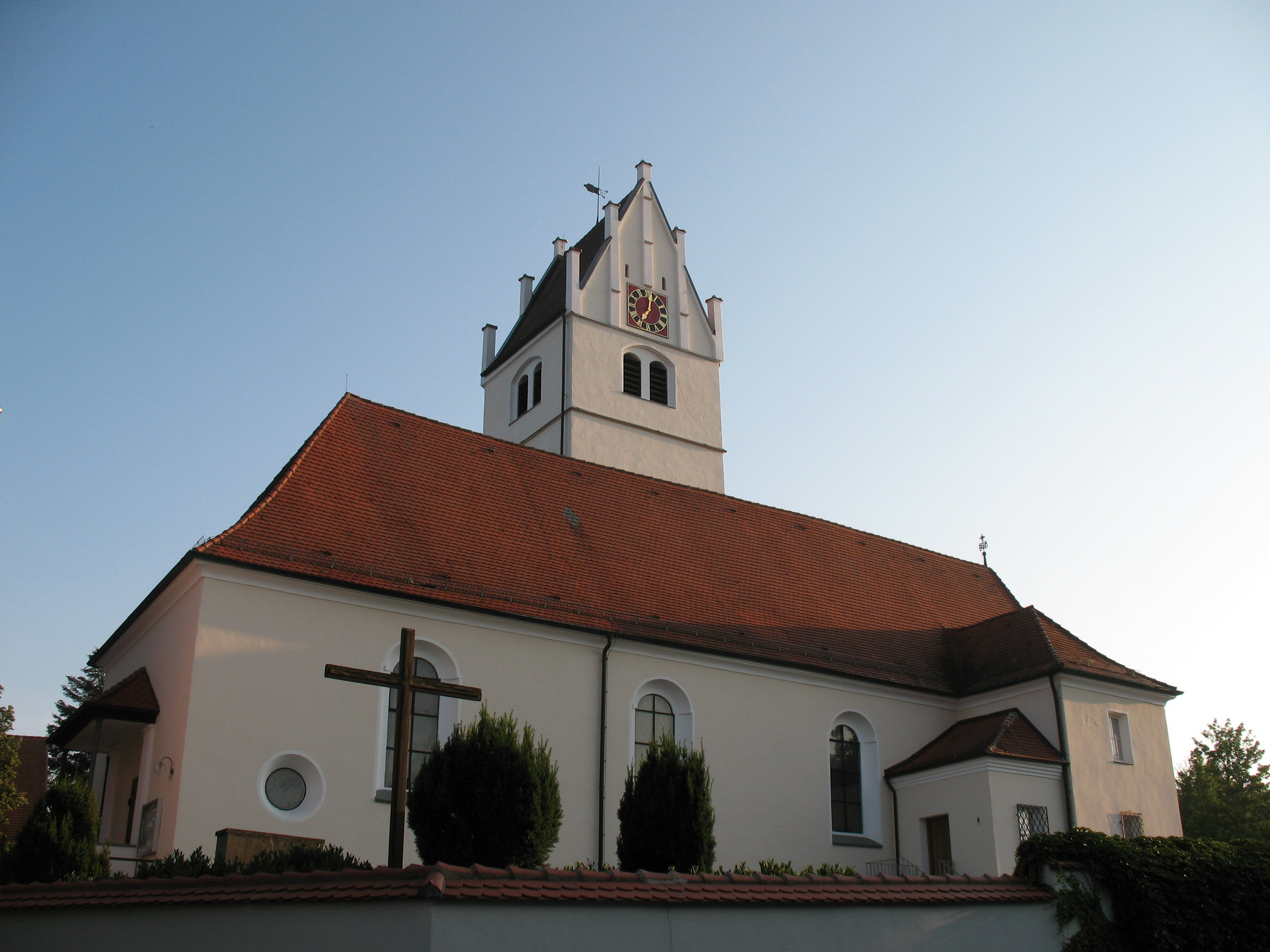 Die Kirche St. Dionysius von Sulmingen in der Süd- Ansicht.